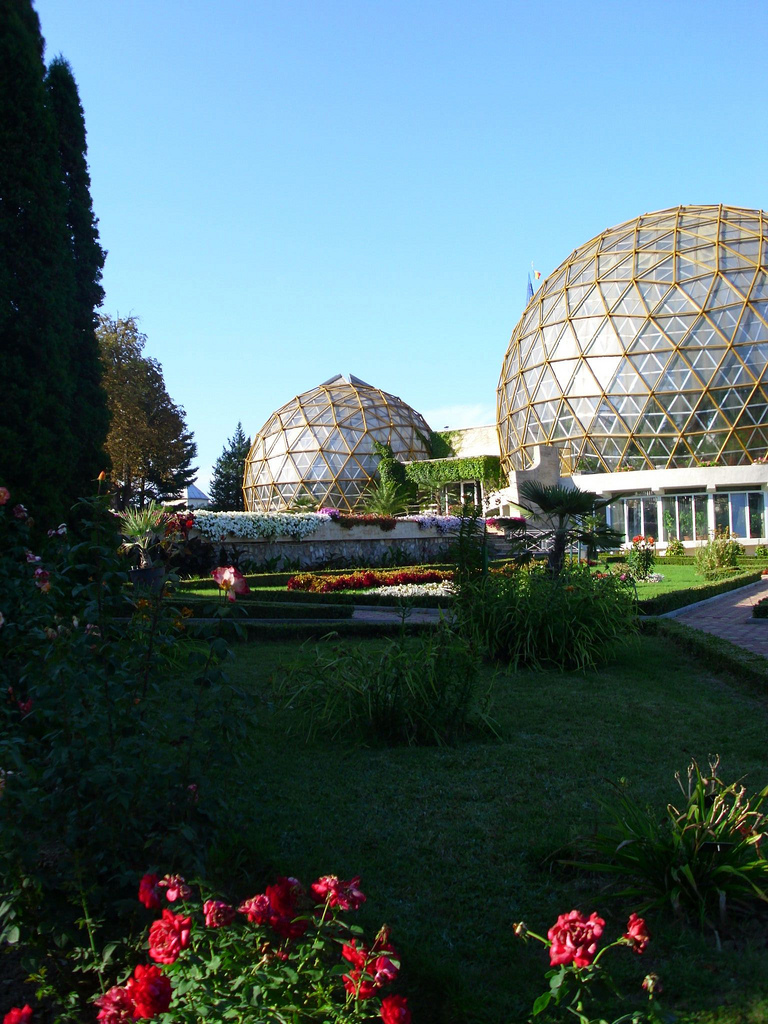 Fostul parc al Castelului Wesselenyi